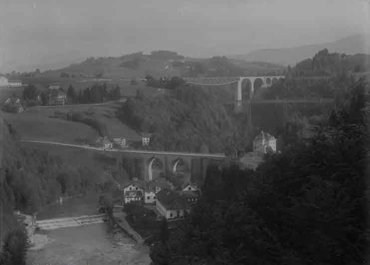 Sittertobel mit Kräzernbrücke (Vordergrund), damaliger Eisenbahnbrücke der Schweizerischen Bundesbahnen (SBB, Mitte) und dem Sitterviadukt der seinerzeitigen Bodensee-Toggenburg-Bahn (BT).